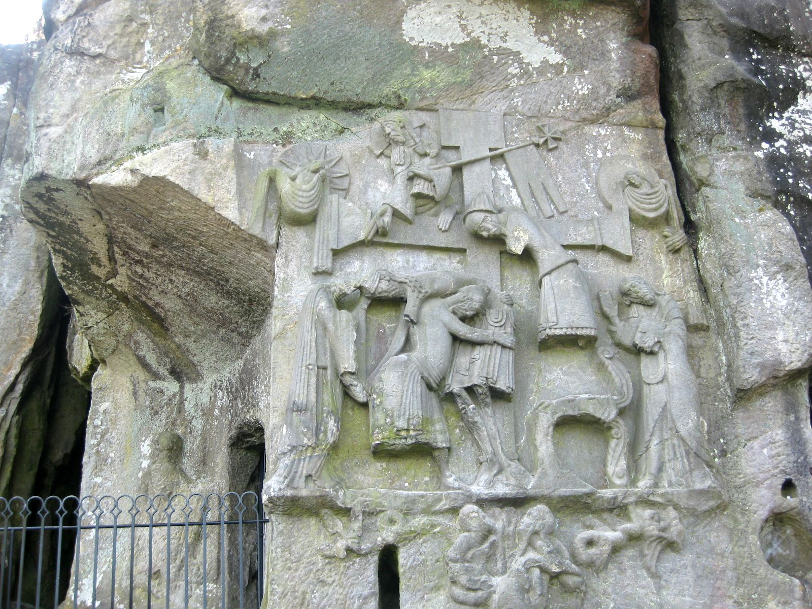 Externsteine, Kreuzabnahmerelief